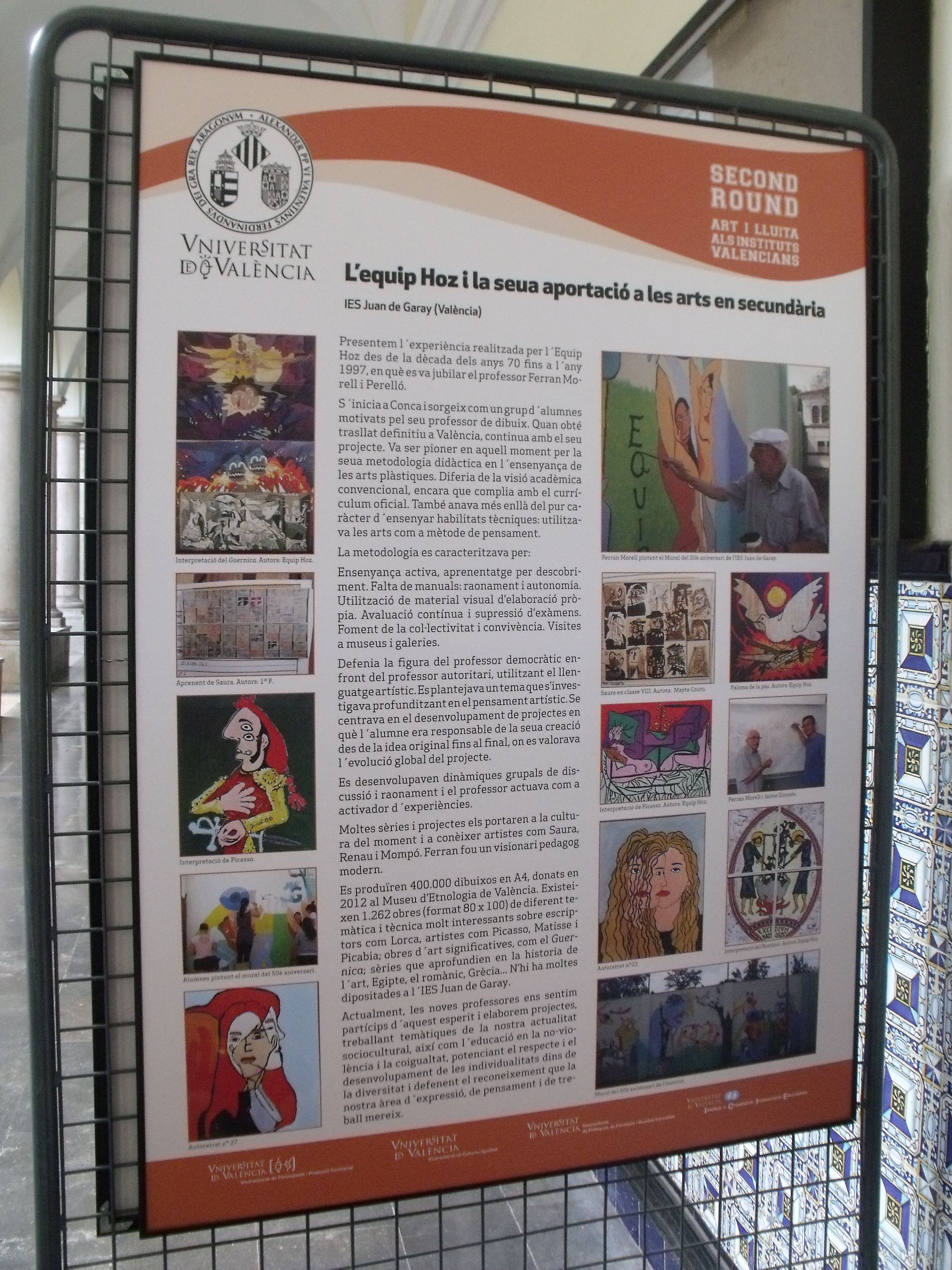 Panel informativo de la labor educativa de la experiencia pedagógica en el mundo de las artes conocida como Equipo Hoz, durante su desarrollo en el IES Juan de Garay de Valencia